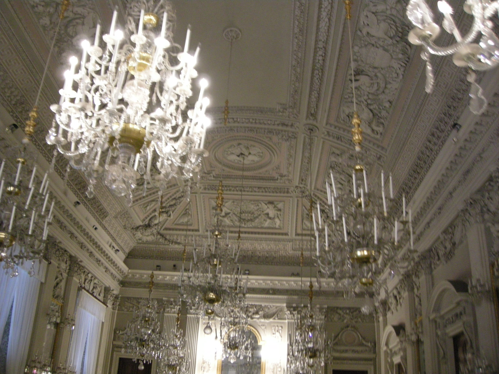 Pitti sala bianca, soffitto